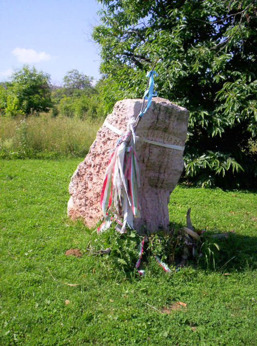 Rockenbauer Pál sírja Zengővárkonyban (Baranya megye, Magyarország)